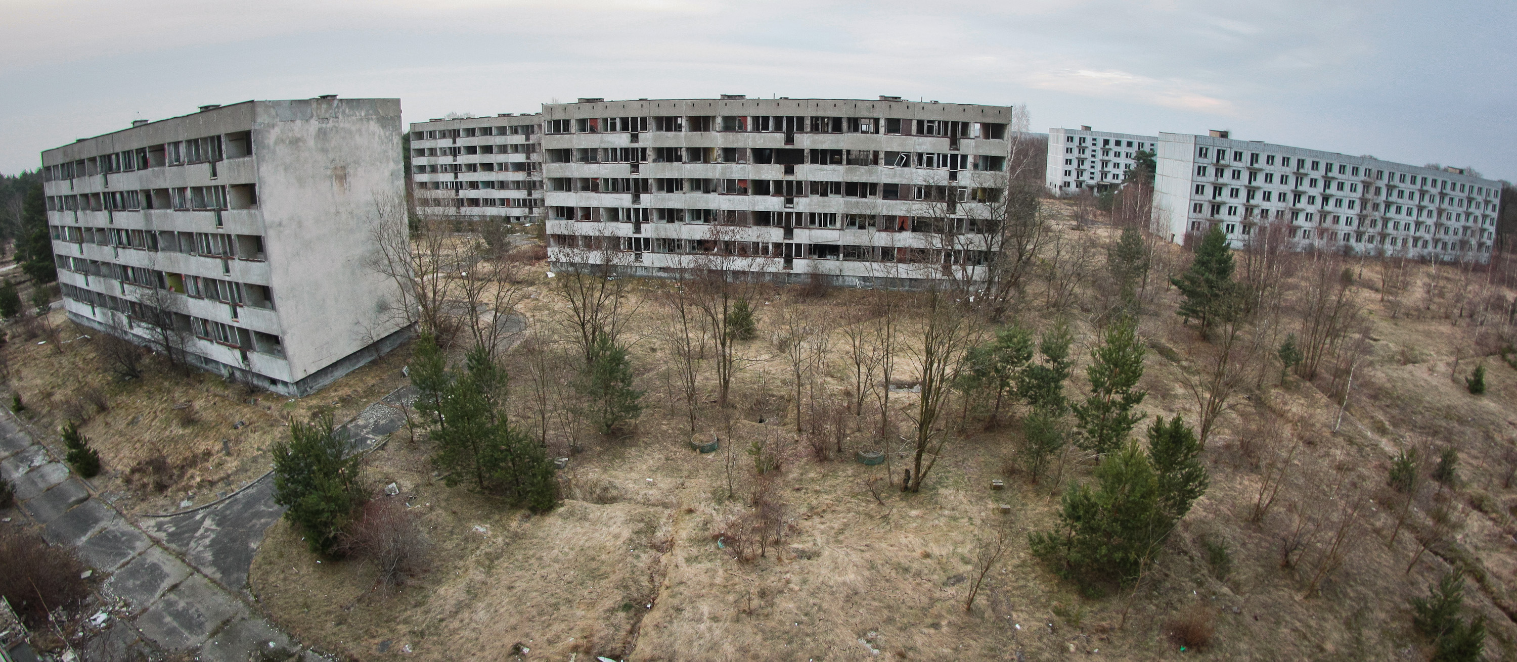 Opuszczone miasto Pstrąże Lost (abanoned) city - Pstrąże...